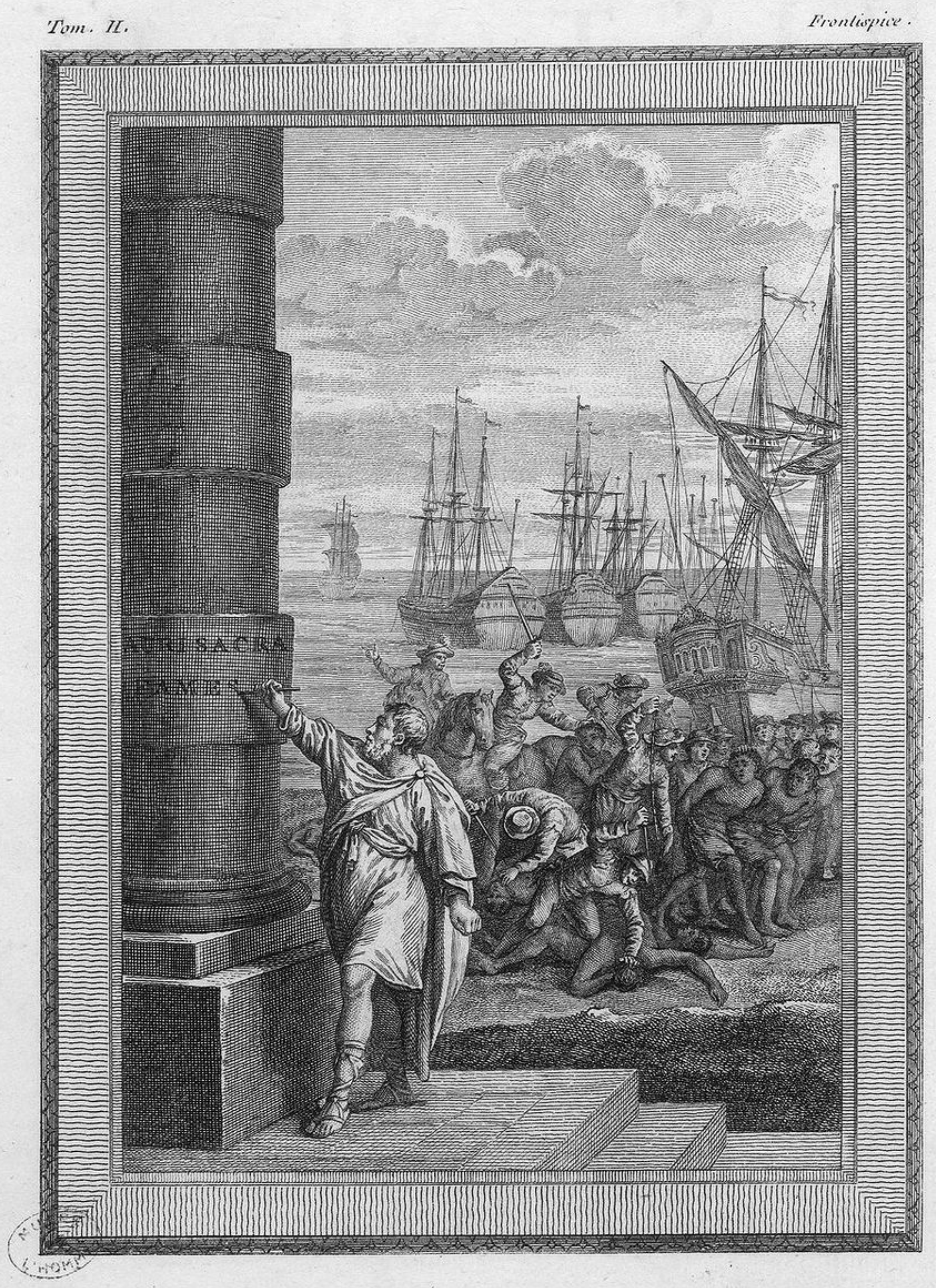 Frontispice : un philospohe trace sur une colonne les mots Auri Sacra Fames. Dans le lointain, des vaisseaux espagnols et portugais en rade. Massacre d'Indiens et mise en esclavages.. Illustrations de Marillier, dessinateur pour Guillaume Thomas Raynal.- Histoire philosophique et politique des deux Indes, Volume 2, 1775.